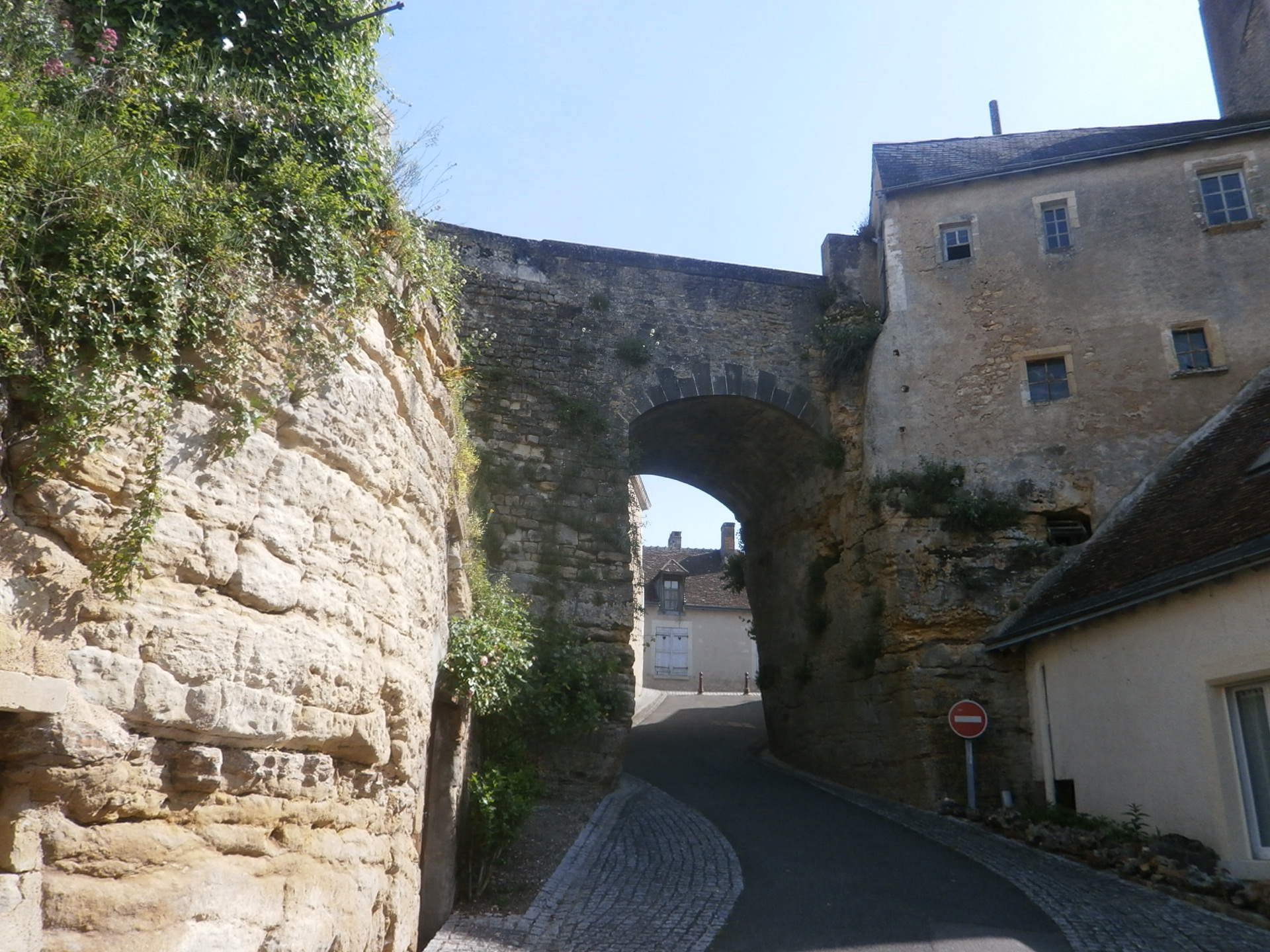 L'impasse Potocki enjambant la rue Branicki.